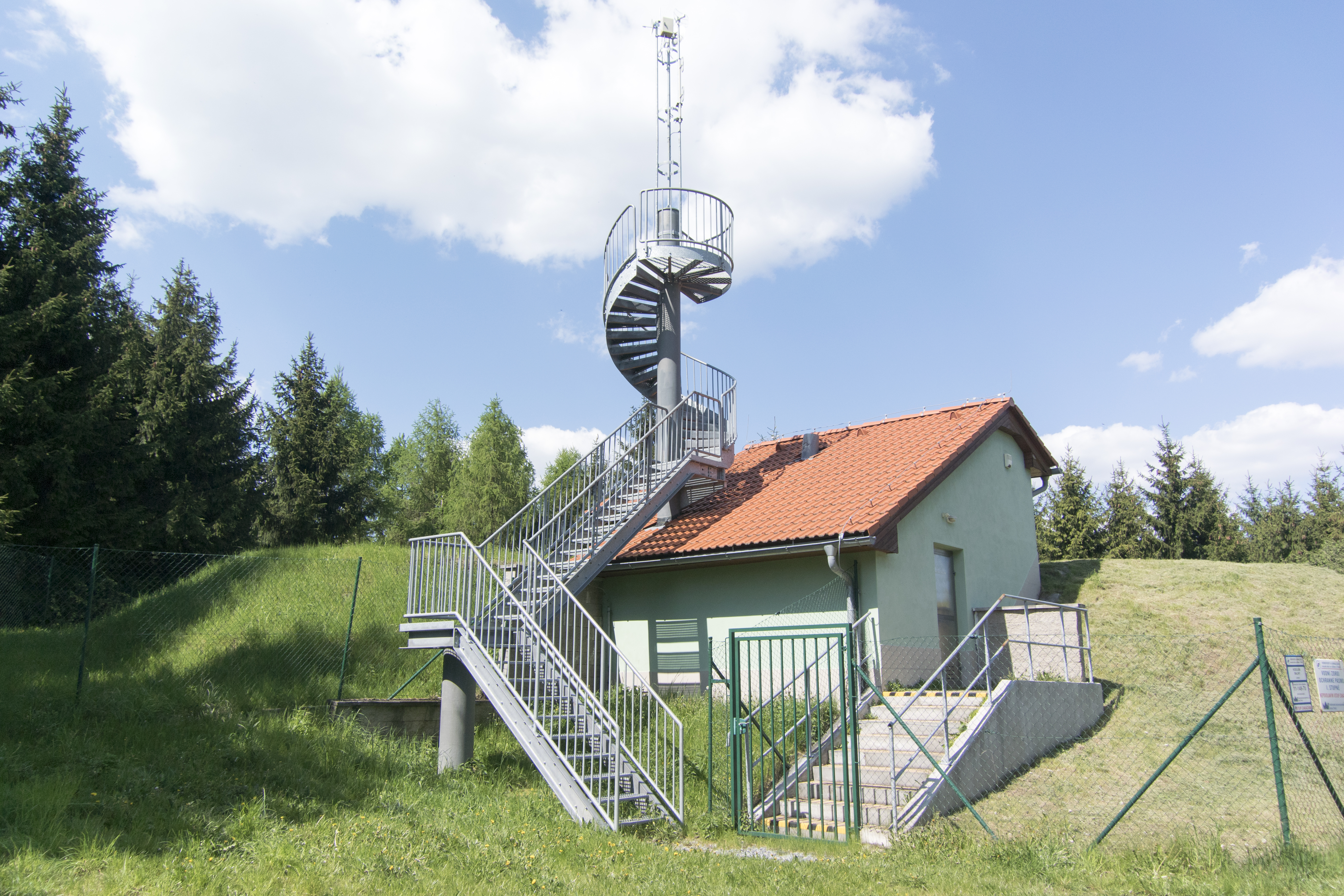 Foto ze dne 7.5.2016